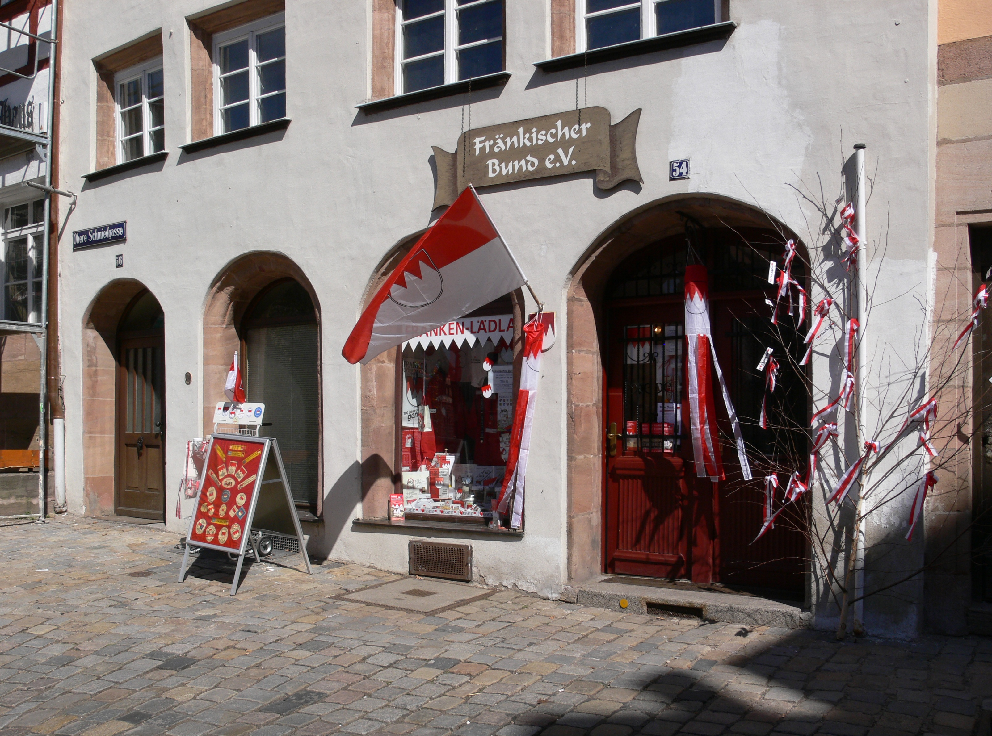 Nürnberg, „Franken-Lädla“ des Vereins „Fränkischer Bund e. V.“, Obere Schmiedgasse 54 (am Platz „Beim Tiergärtnertor“)